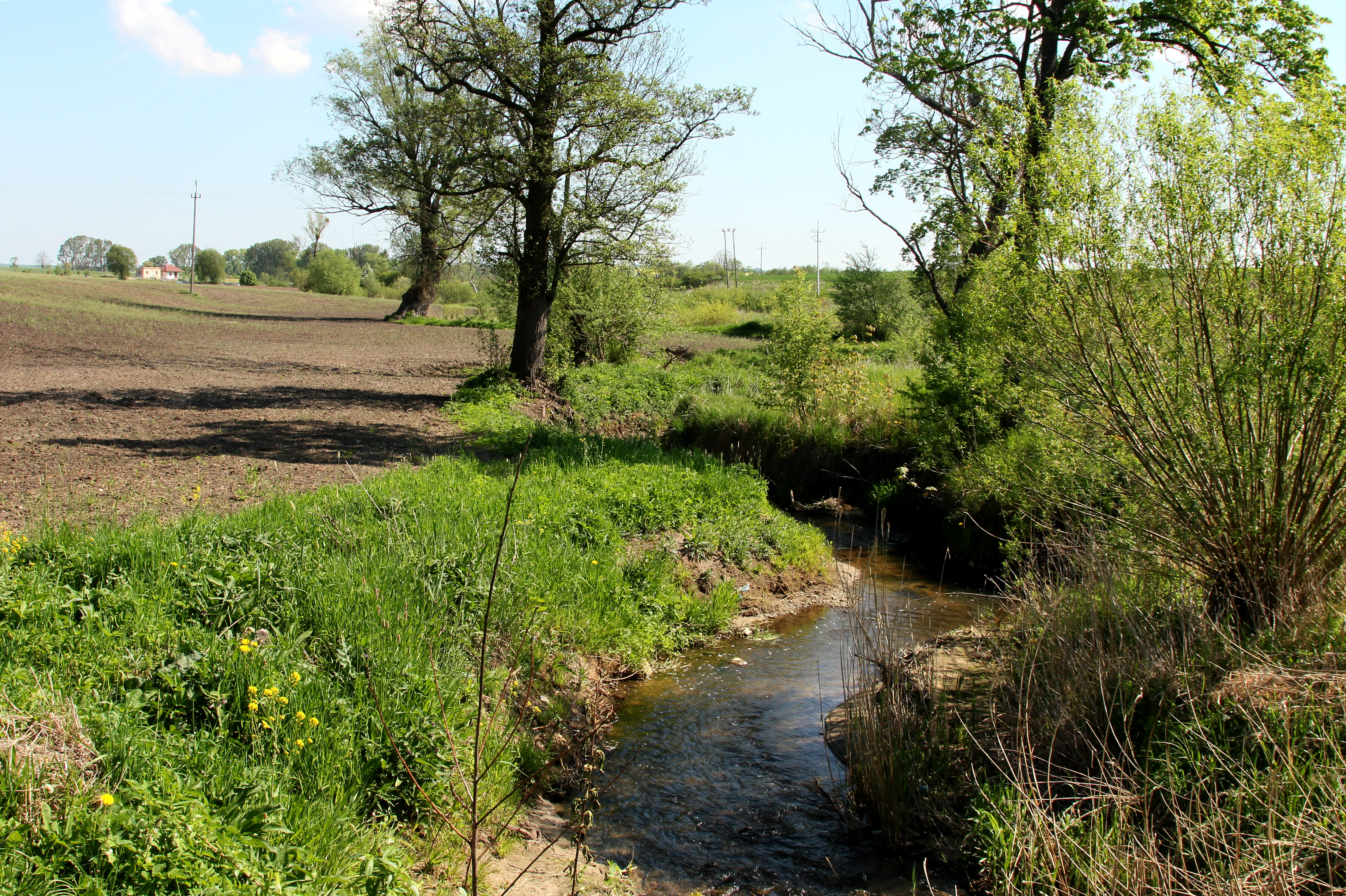 Strumyk w miejscowości Sątopy-Samulewo.